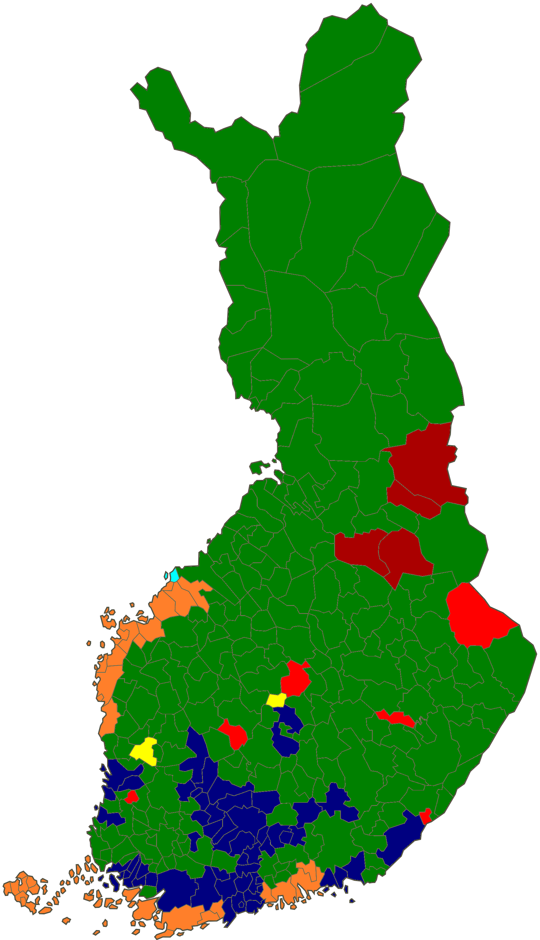 Suomen Eurovaalit 2014